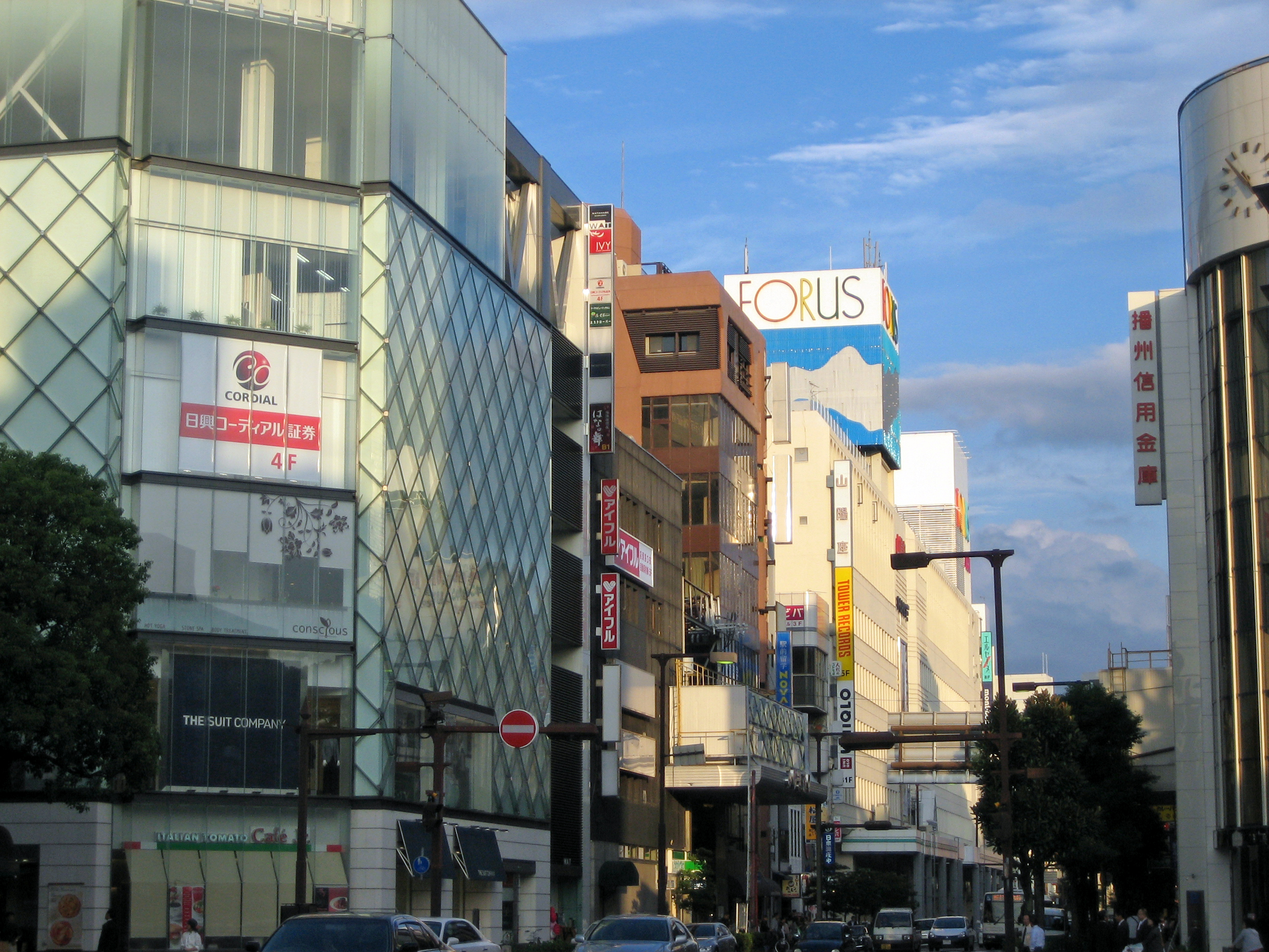 姫路市十二所前線のビル群。西側より撮影。